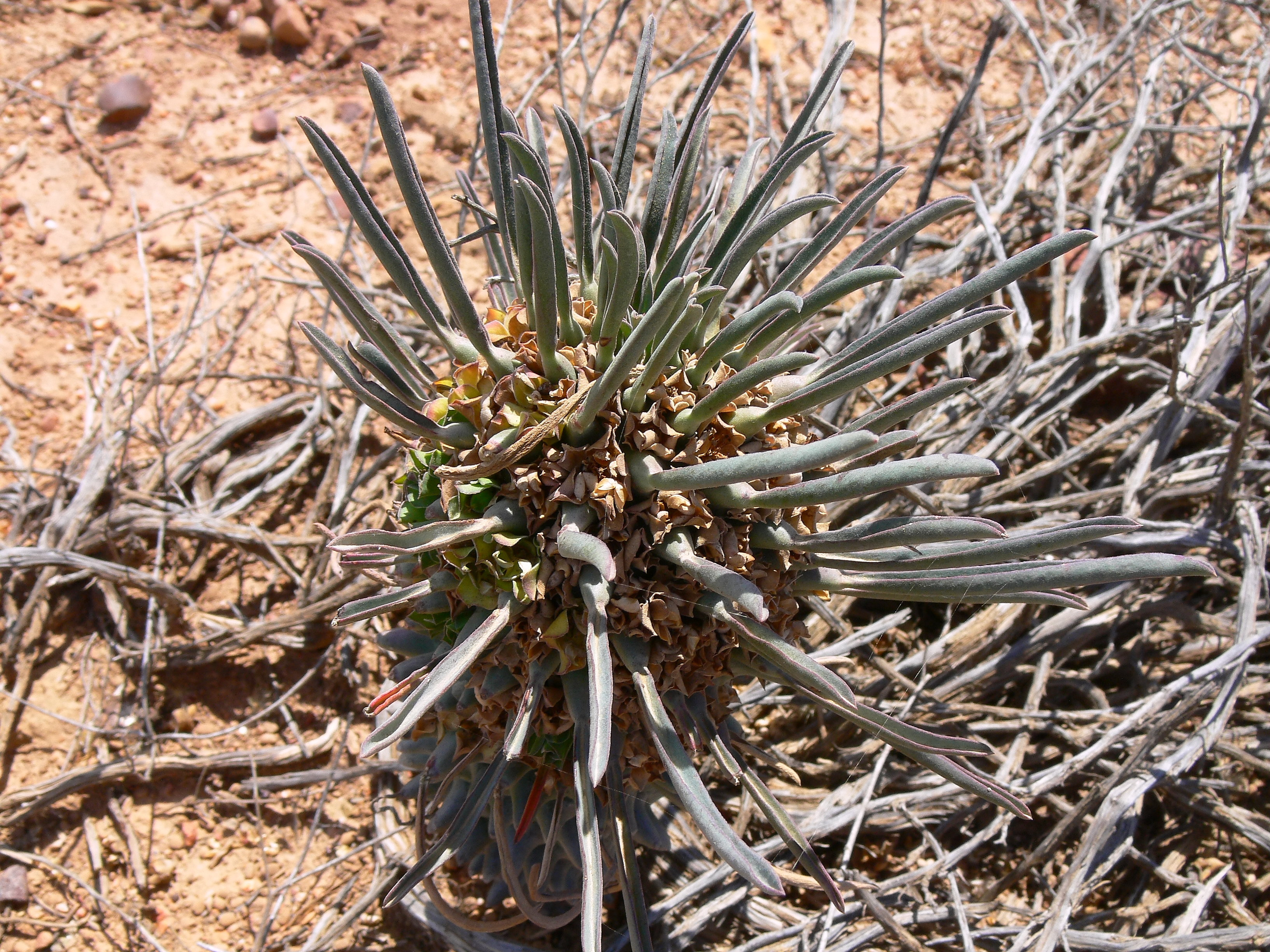 Euphorbia clandestina Jacq. , nahe Barrydale, Westkap, Südafrika